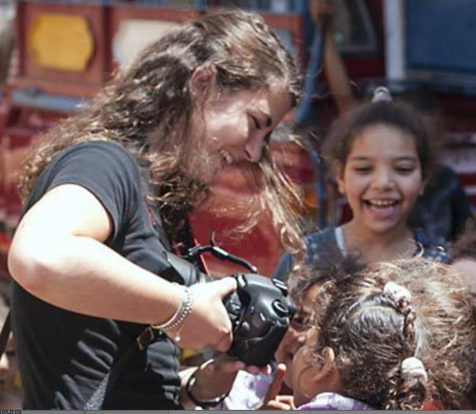 Camille Lepage par Ahmed Hayman